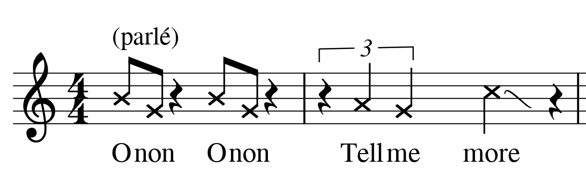 Extrait de la pièce XIV d'Anna Livia Plurabelle d'André Hodeir